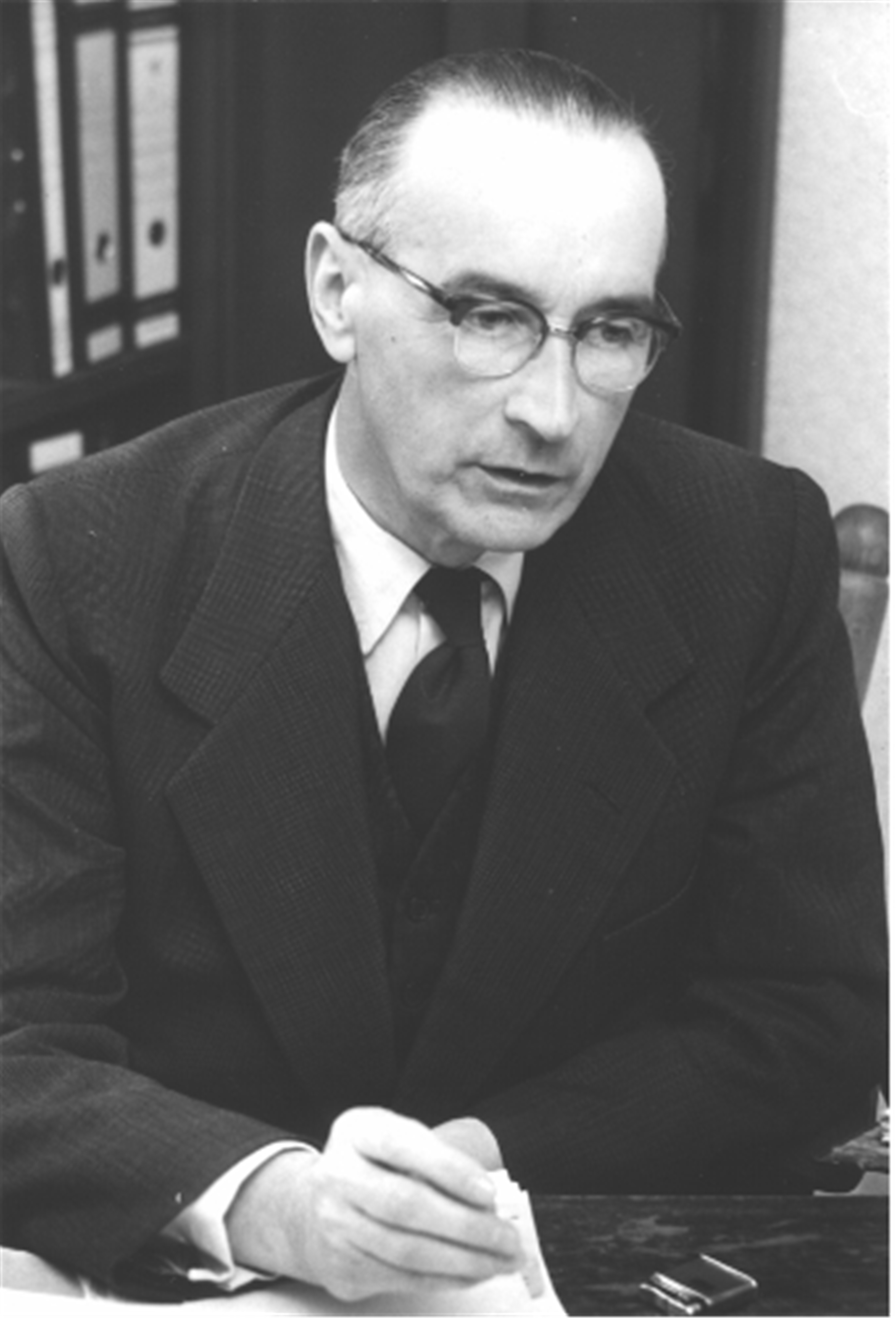 G.I.M. van Kemenade, burgemeester van Grave, 1944-1946